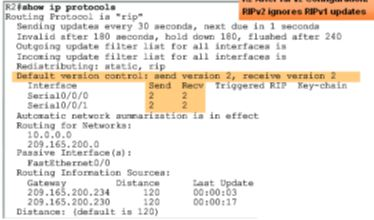 Монгол: тохиргоо шалгах